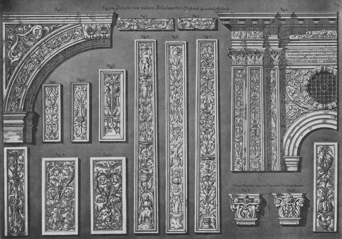 Zamek Piastów w Brzegu ornamenty architektoniczne.